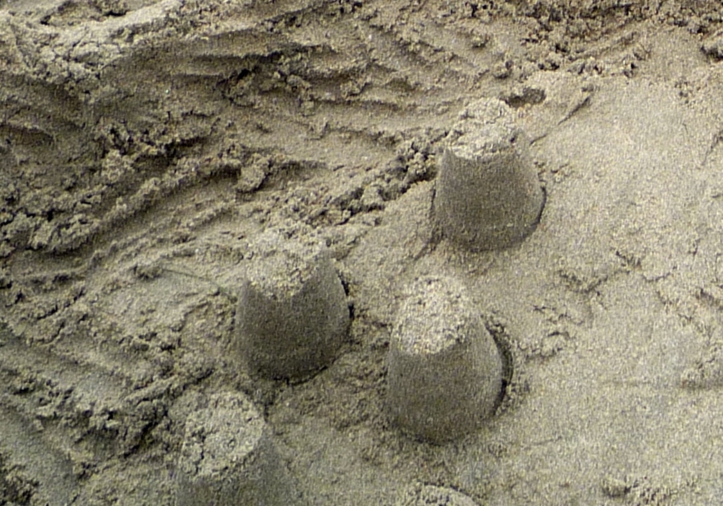 bábovky z písku